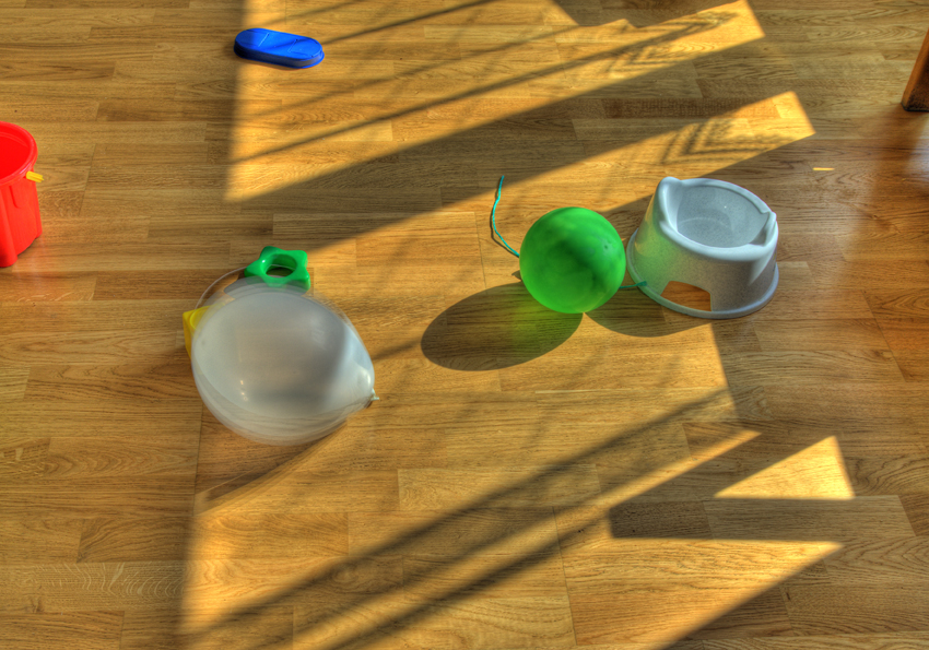 Věra Stuchelová´s photographs